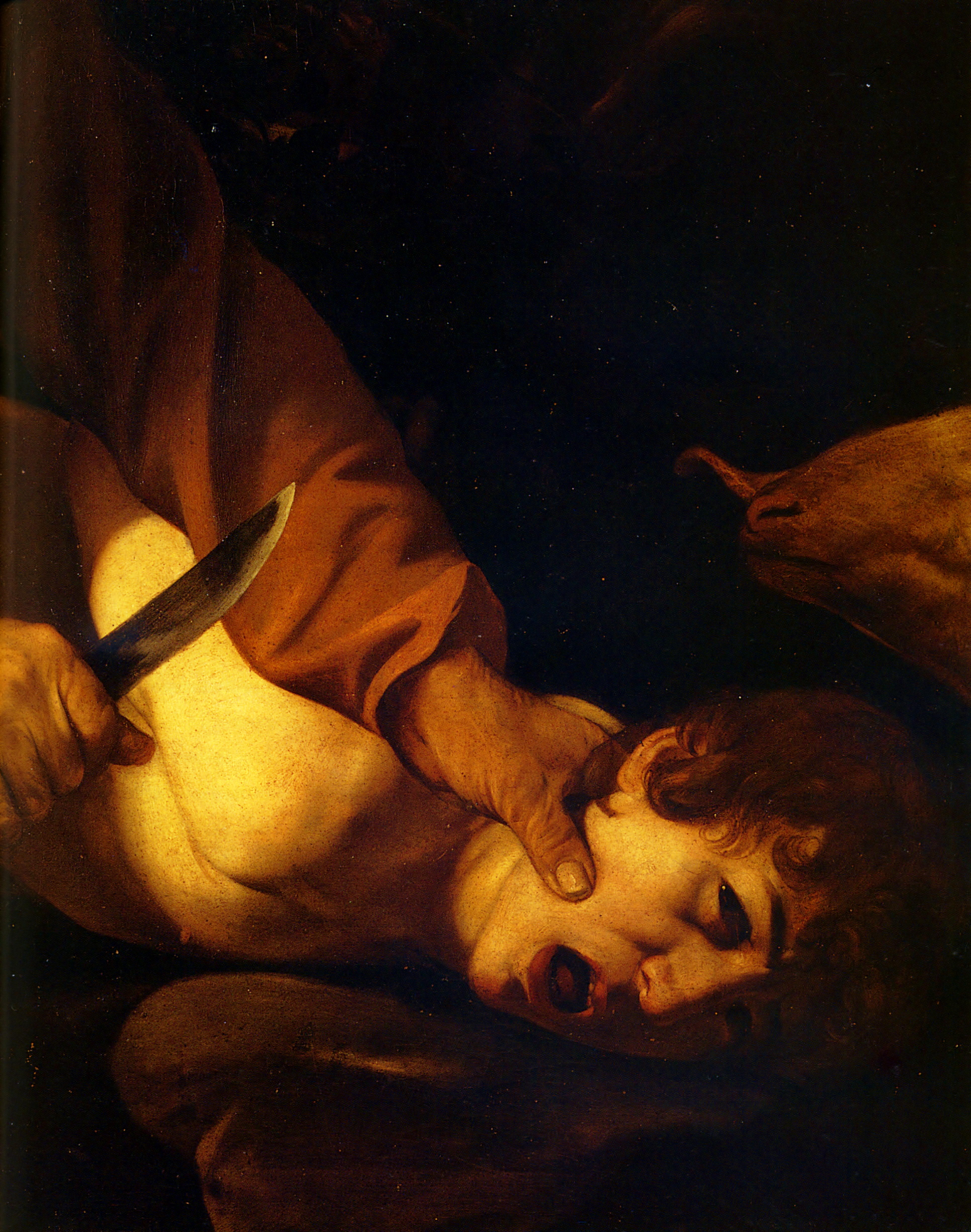 Sacrificio di Isacco (ingrandimento) Caravaggio: Firenze, Galleria degli Uffizi.